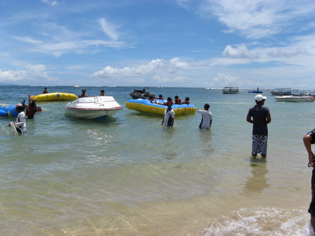 Suasana di Tanjung Benoa, Jumat, 6 Januari 2012. Anda diperbolehkan untuk menyalin gambar ini​​, bahkan untuk tujuan komersial.